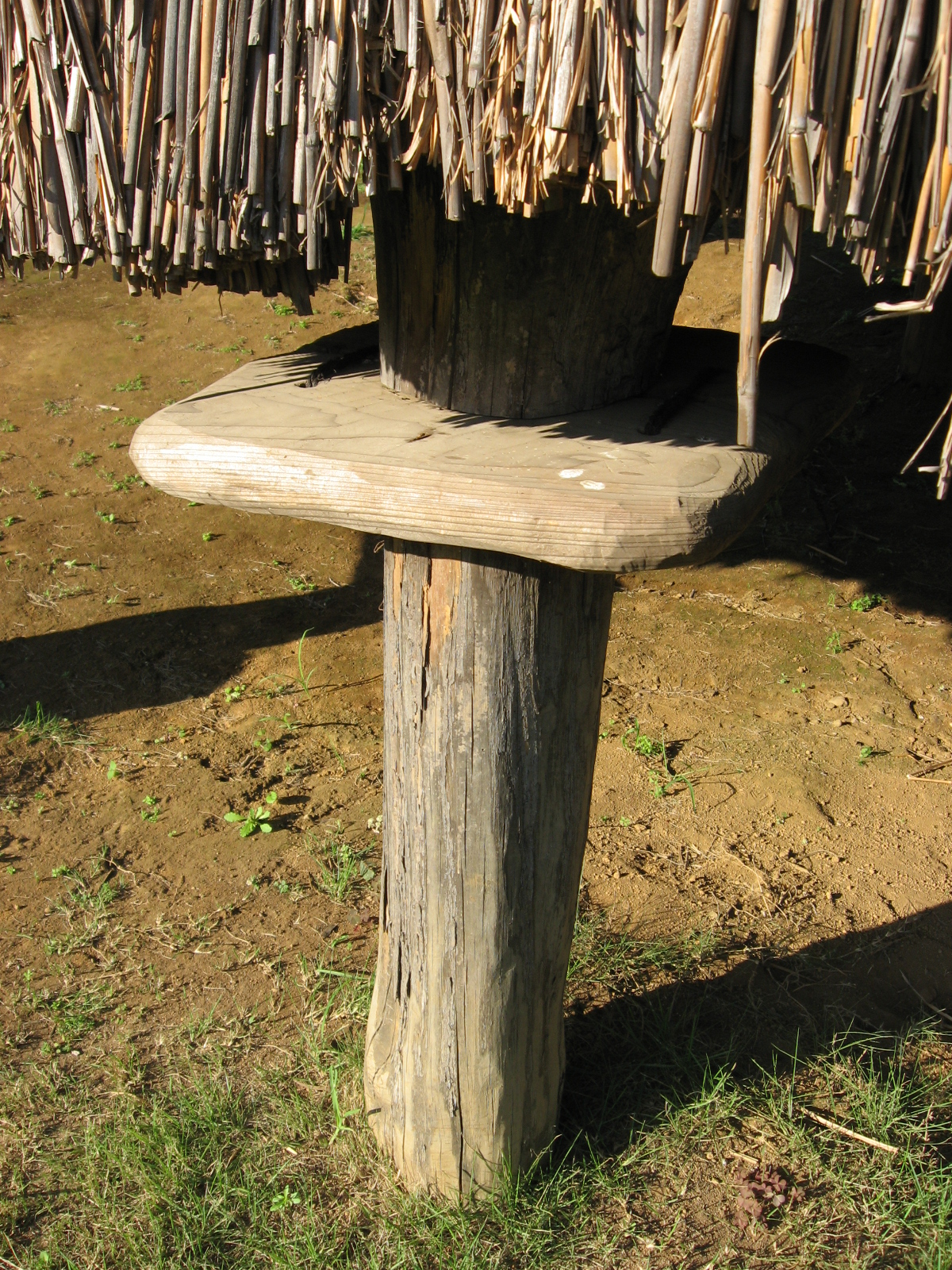 高床式倉庫のねずみ返し